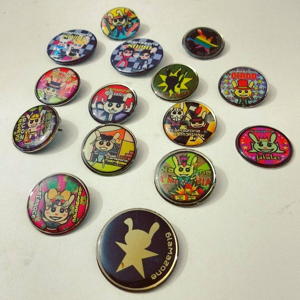 Coleção de bottom-passes da Glamazone.